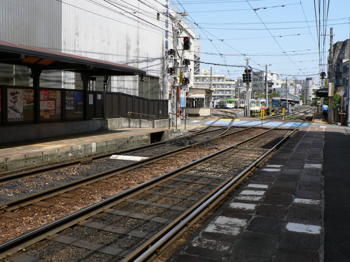 長崎電気軌道、浦上車庫前電停。左が赤迫行き/浦上車庫止め電車用のホーム、右奥が正覚寺下・蛍茶屋行き/浦上車庫止め電車用のホーム。手前は、車庫から出てきた正覚寺下・蛍茶屋行き電車の乗り場として、ラッシュ時などに使用されるホーム。